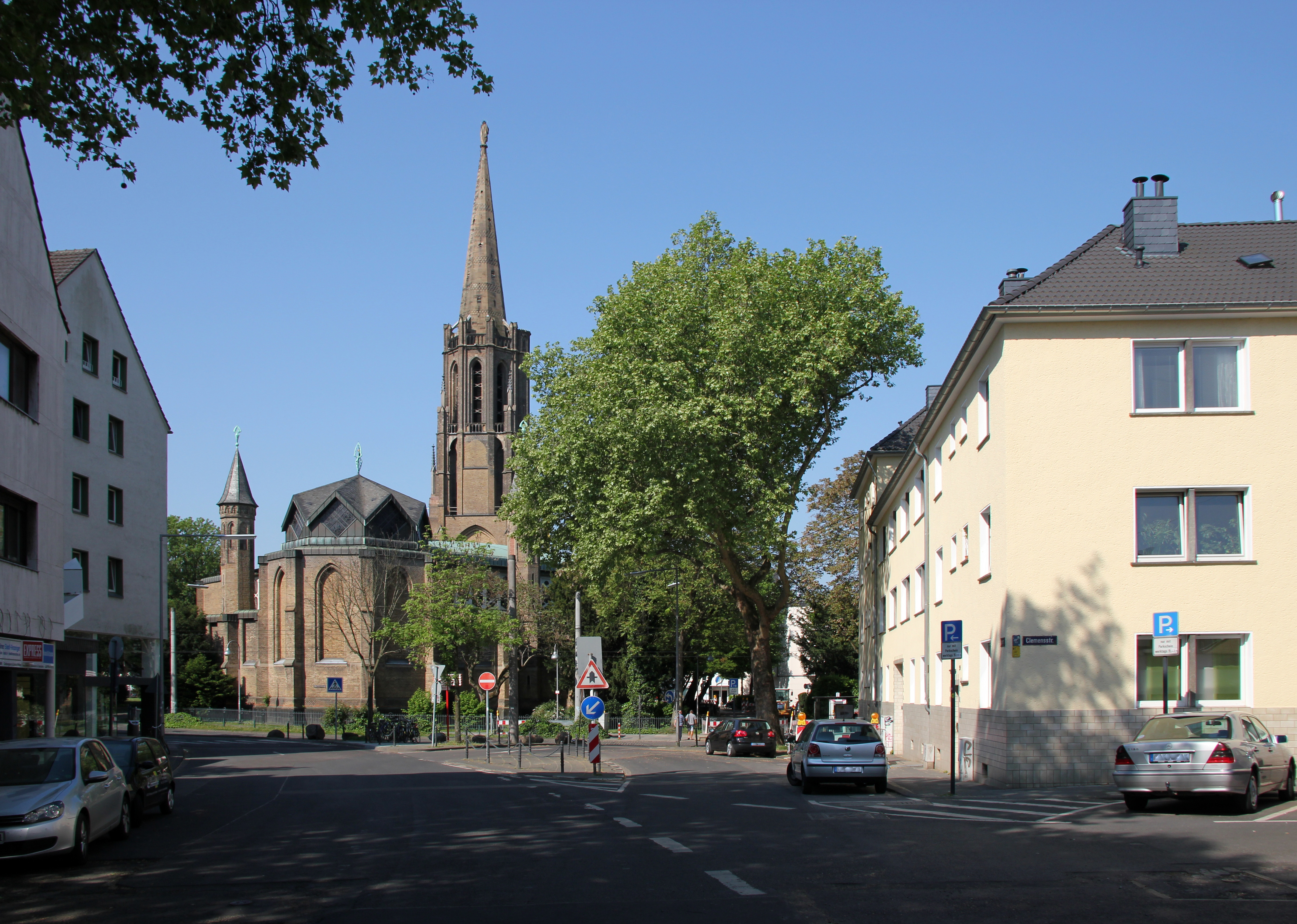 Köln Mauritiuskirche Mauritiussteinweg und östlich vorgelagerte Bob- und Clemensstraße